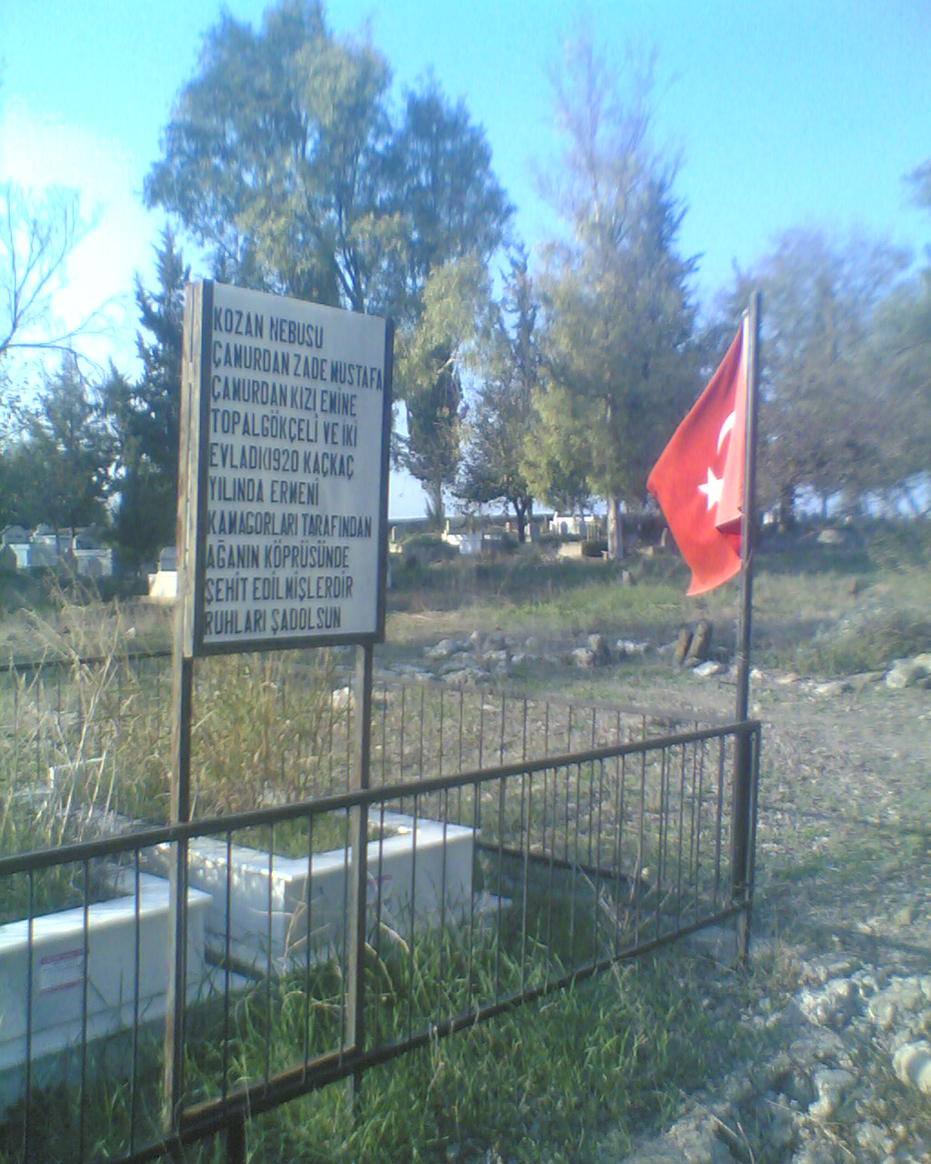 Adana iline bağlı İmamoğlu ilçesinde bulunan Ağzıkaraca köyünden bir görüntü.